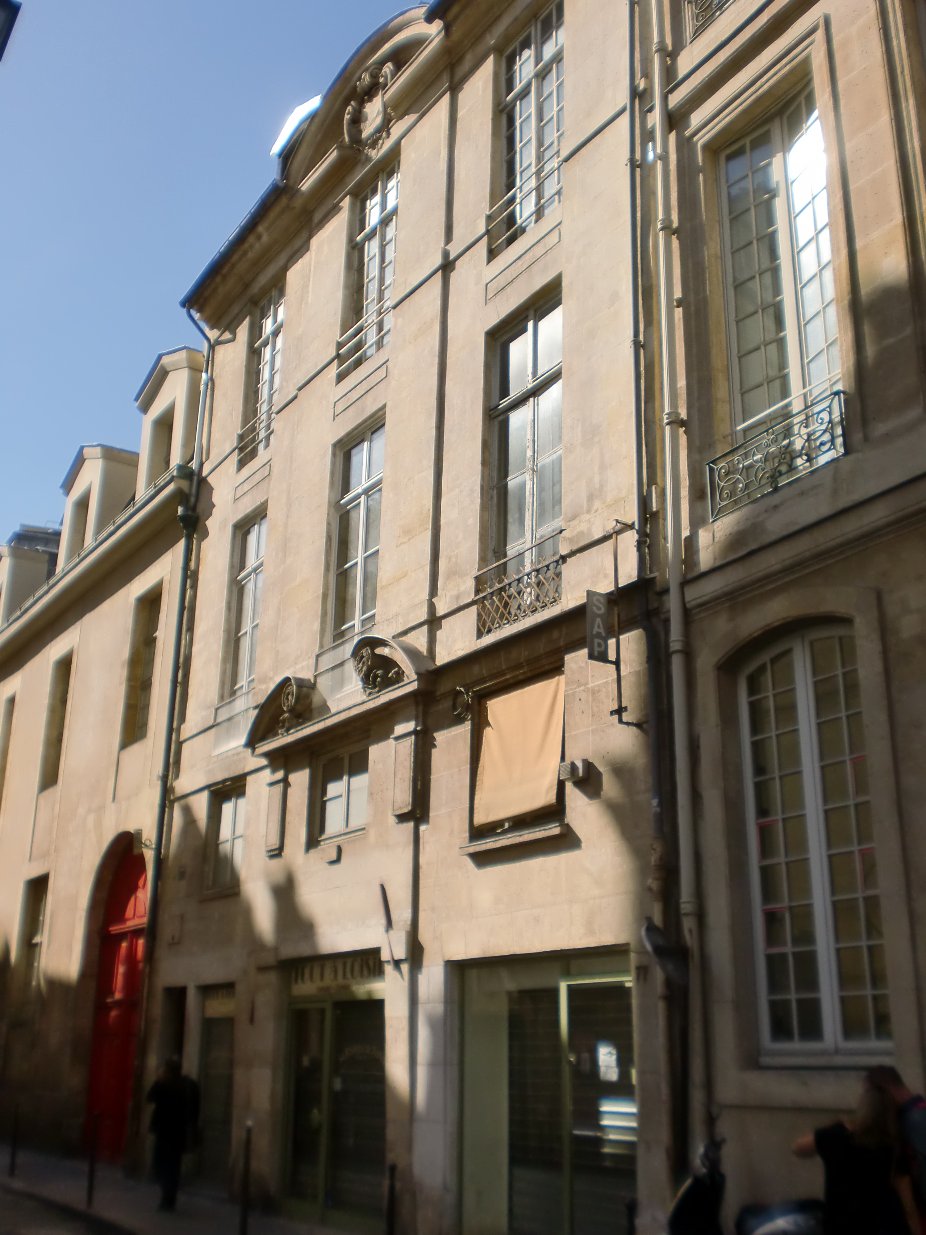 Hôtel de Vic, 77 rue du Temple 75003 Paris. .